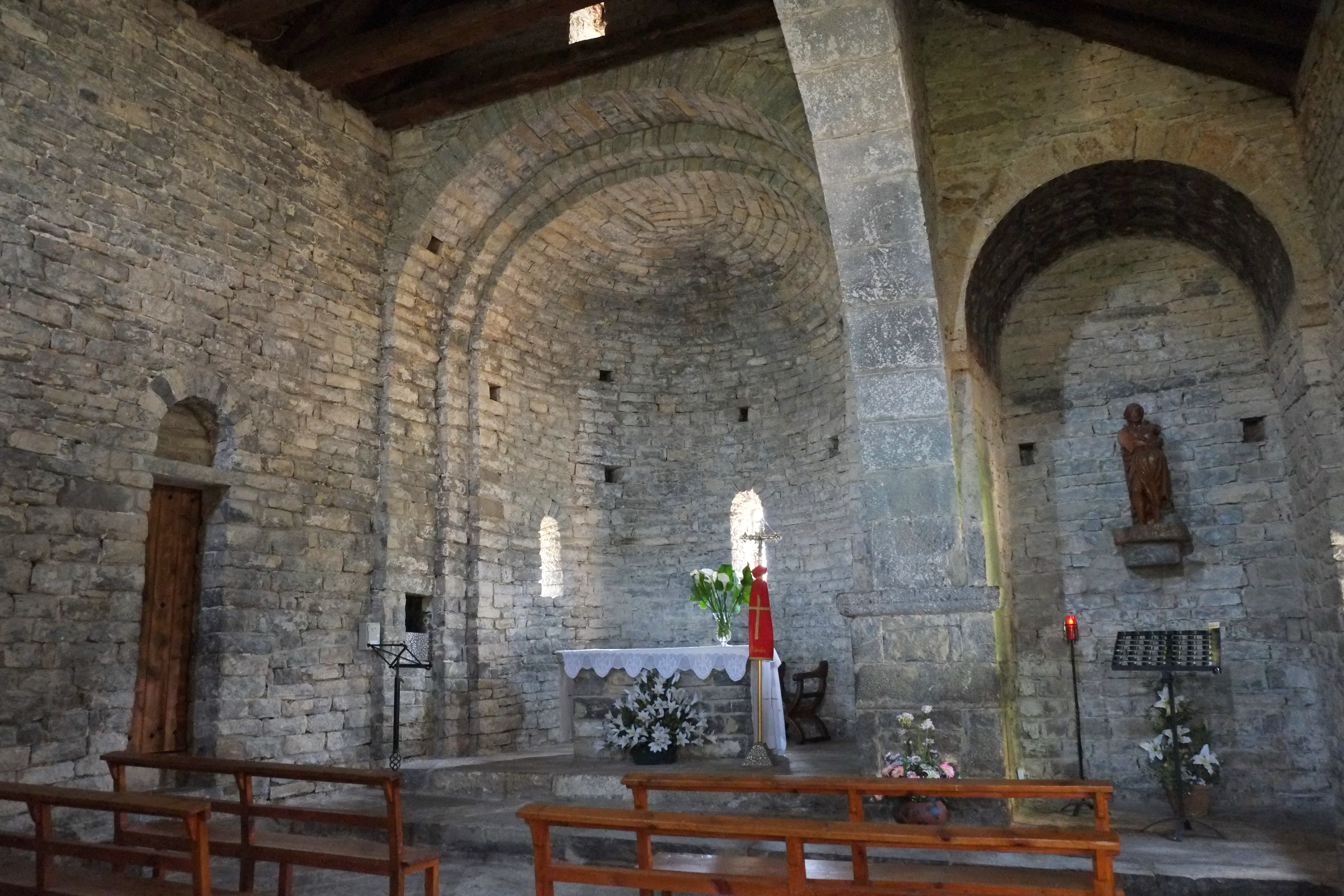 Kirche San Martín in Oliván in der Provinz Huesca in Aragonien (Spanien)